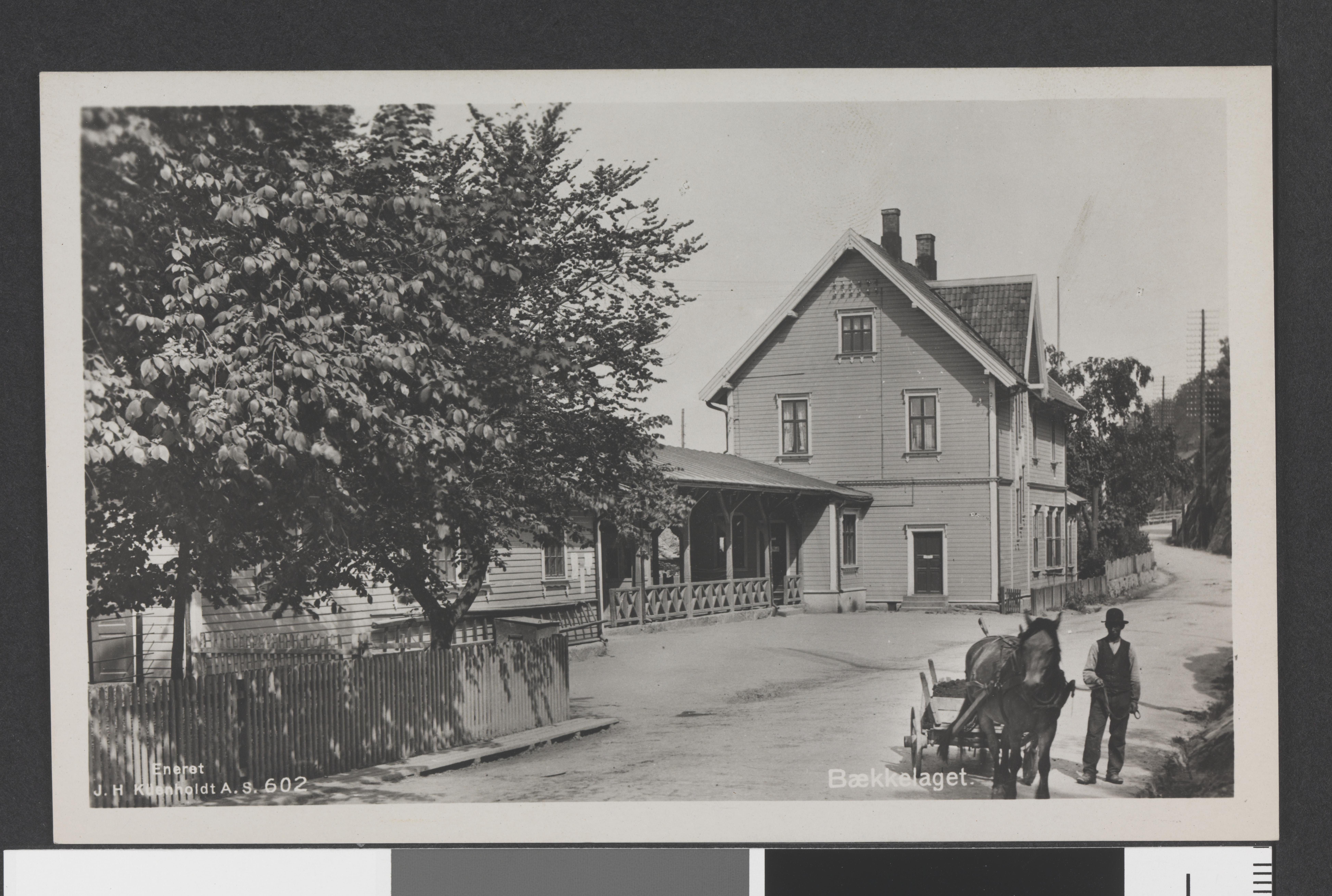 Bildet er hentet fra Nasjonalbibliotekets bildesamling Bekkelaget,Bekkelaget stasjon, Oslo, Oslo